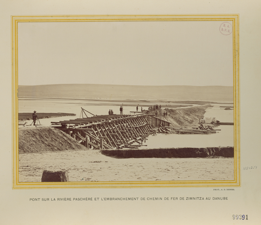 From the album "La construction des chemins de fer militaires de l'armée russe - Bucharest-Zimnicea" Pont sur la rivière paschéré et l'embranchement de chemin de fer de Zimnitza au Danube